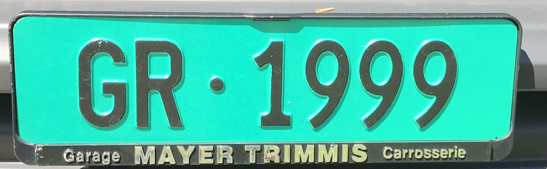 Kontrollschild Landw. Fahrzeuge